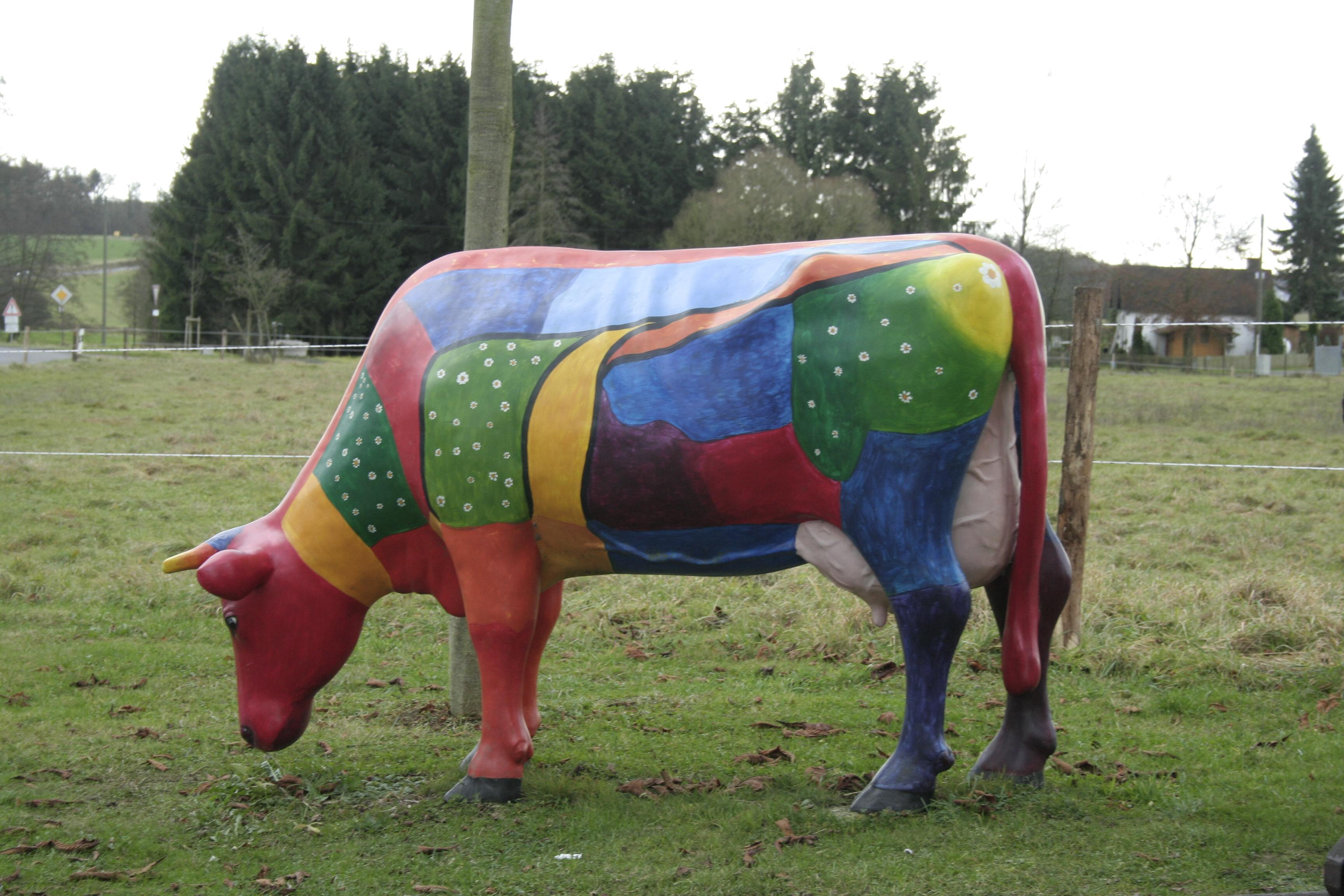 "Bunte Kuh" - Ortsausgang Busenhausen im Westerwald